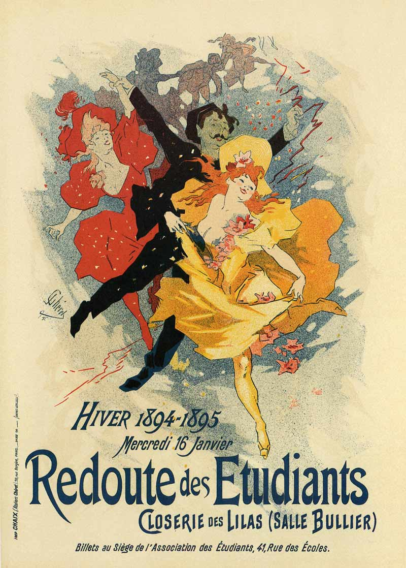 "Redoute des Etudiants" , Closerie des Lilas (Salle Bullier)